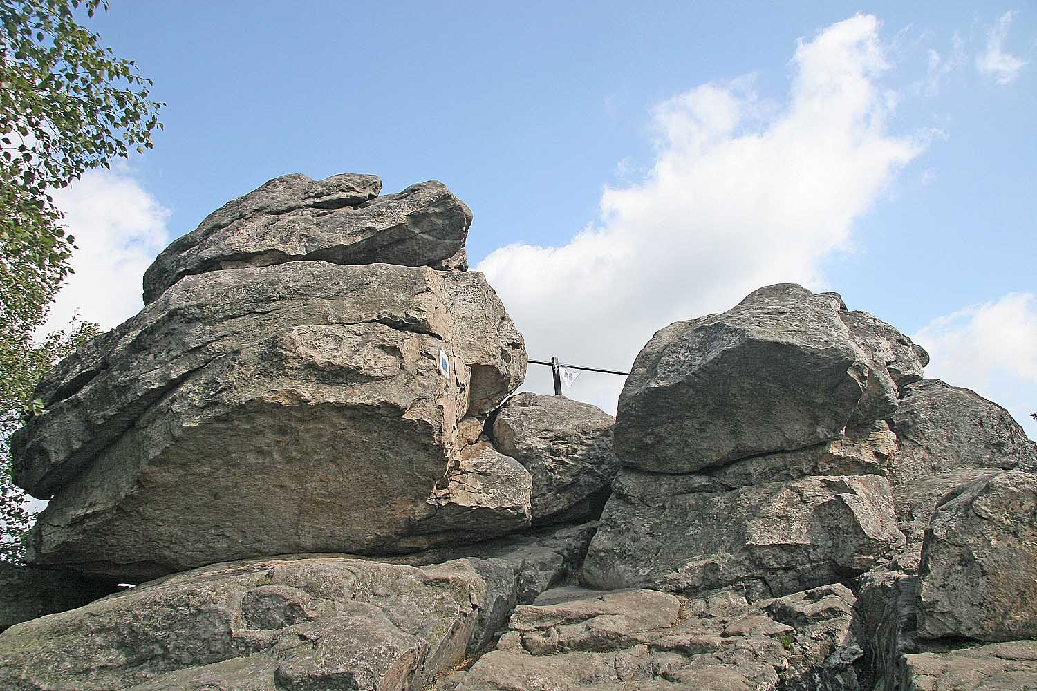 Skalní útvary na vrcholu Devíti skal, district ŽĎár nad Sázavou, Czech Republic autor: Prazak date: 5. 9. 2006